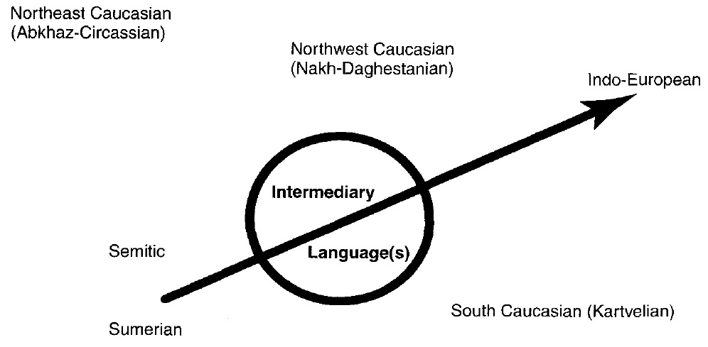 نحوه ی پیدایش و ارتباط زبانهای هندواروپایی با زبان های سومری و سامی و قفقازی